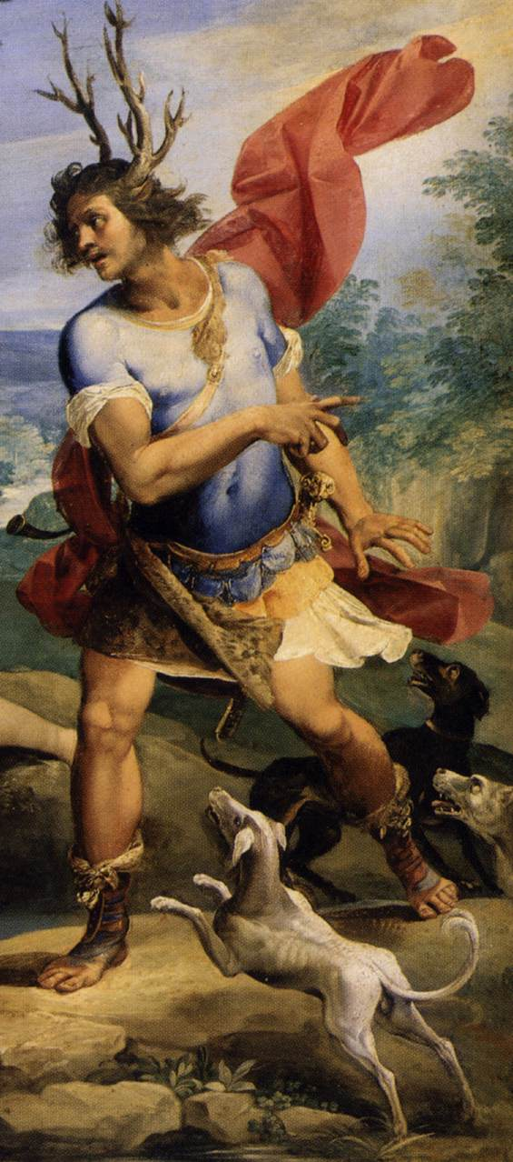 detail